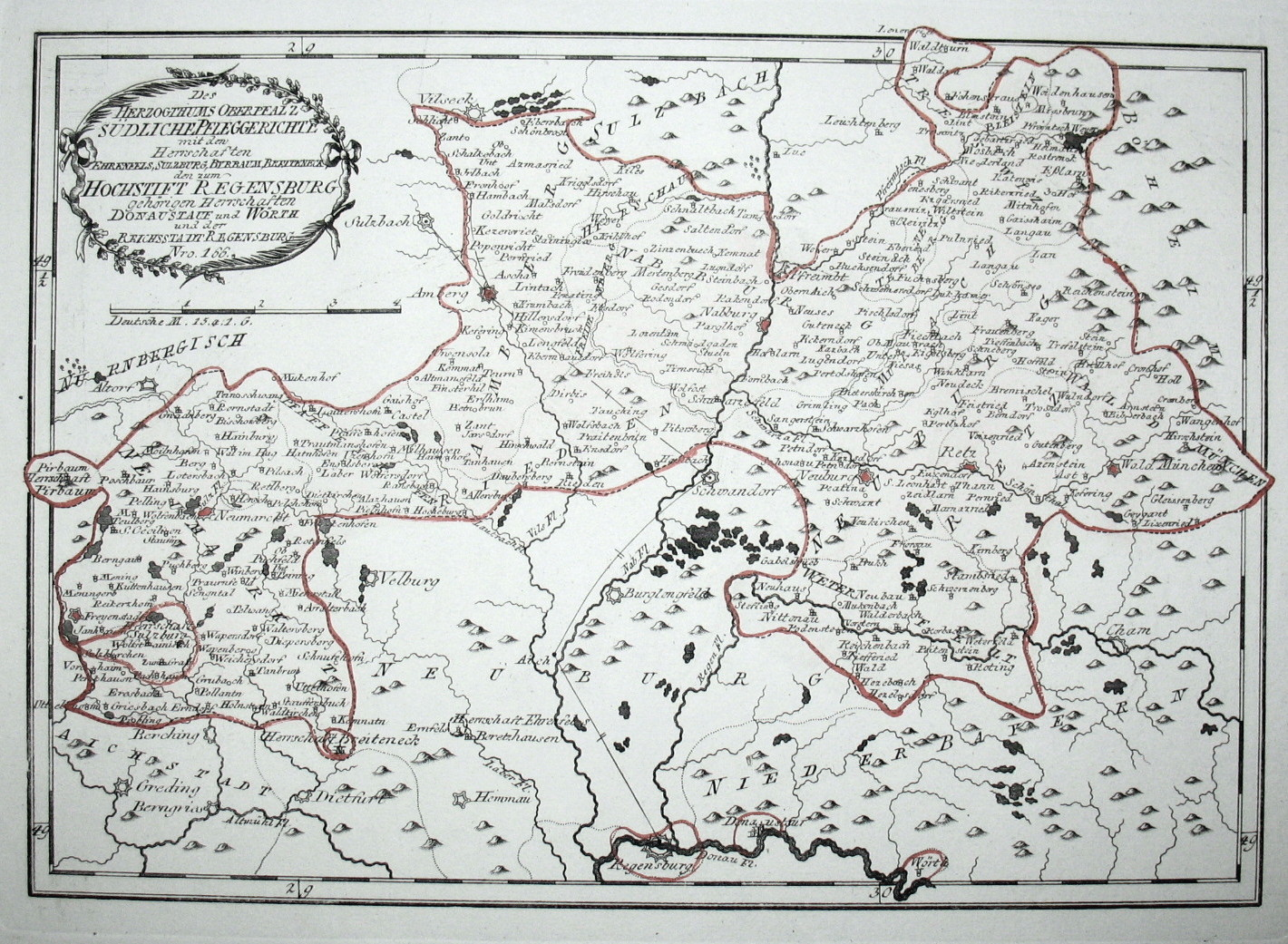 Des Herzogthums Oberpfalz Südliche Pfleggerichte mit den Herrschaften Ehrenfels, Sulzburg, Byrbaum, Breiteneck, den zum Hochstift Regensburg gehörigen Herrschaften Donaustauf und Wörth an der Donau und der Reichsstadt Regensburg. Nro. 166. Kolorierter Kupferstich